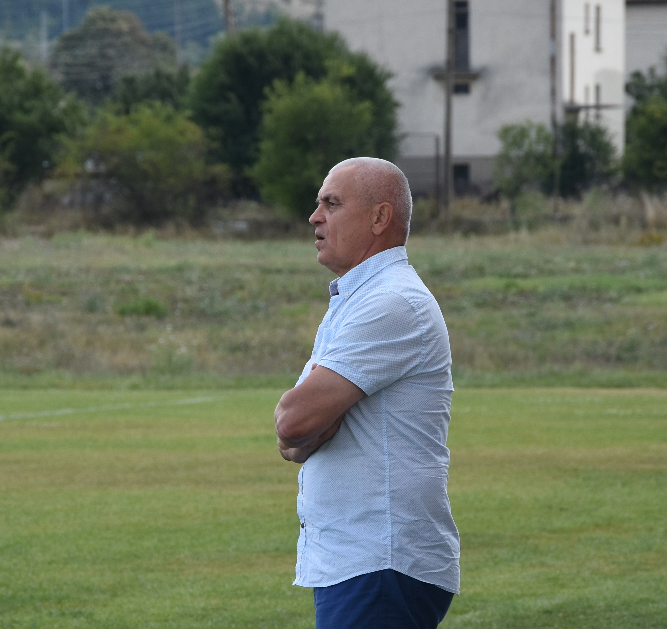 Илия Величков